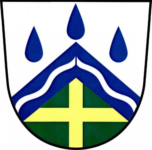 znak, Široký Důl, okres Svitavy